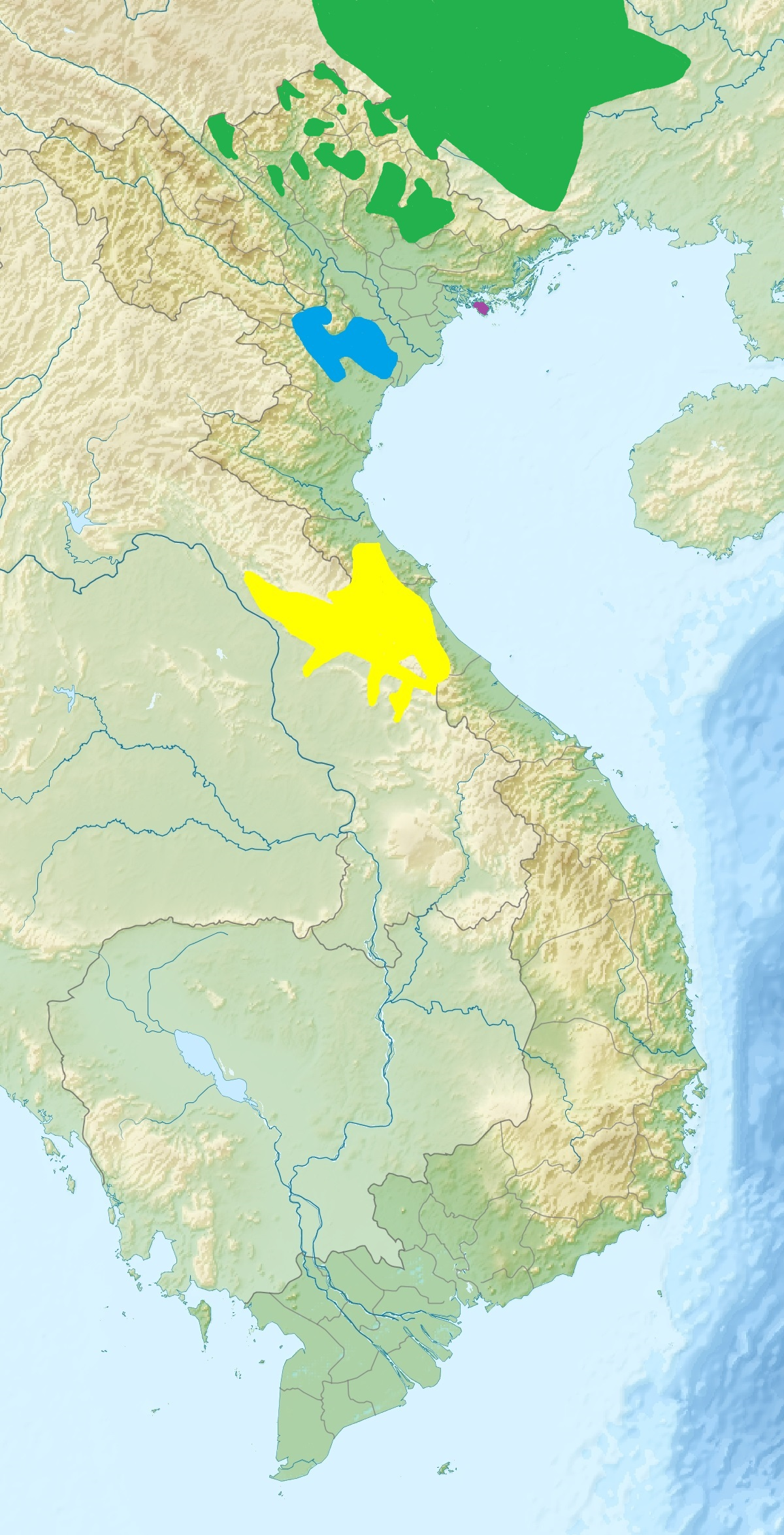 Verbreitung der francoisi-Gruppe innerhalb der Haubenlanguren (Trachypithecus), grün Tonkin-Schwarzlangur (T. francoisi), gelb Hatinh-Langur (T. hatinhensis), blau Delacour-Schwarzlangur (T. delacouri), violett Cat-Ba-Langur (T. poliocephalus)